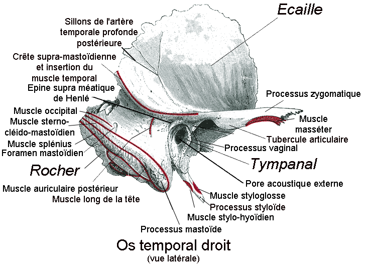 Os temporal. Vue latérale. Anatomie humaine